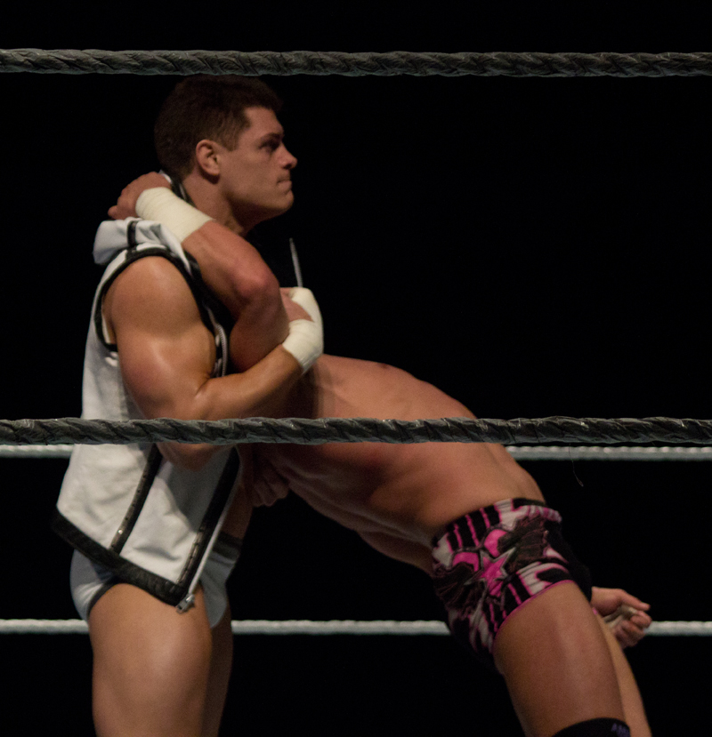 Cody Rhodes préparant le Cross Rhodes sur Justin Gabriel.